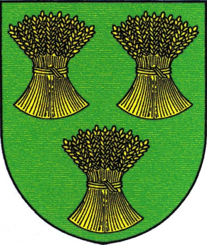 znak, Nová Ves u Nového Města na Moravě, okres Žďár nad Sázavou